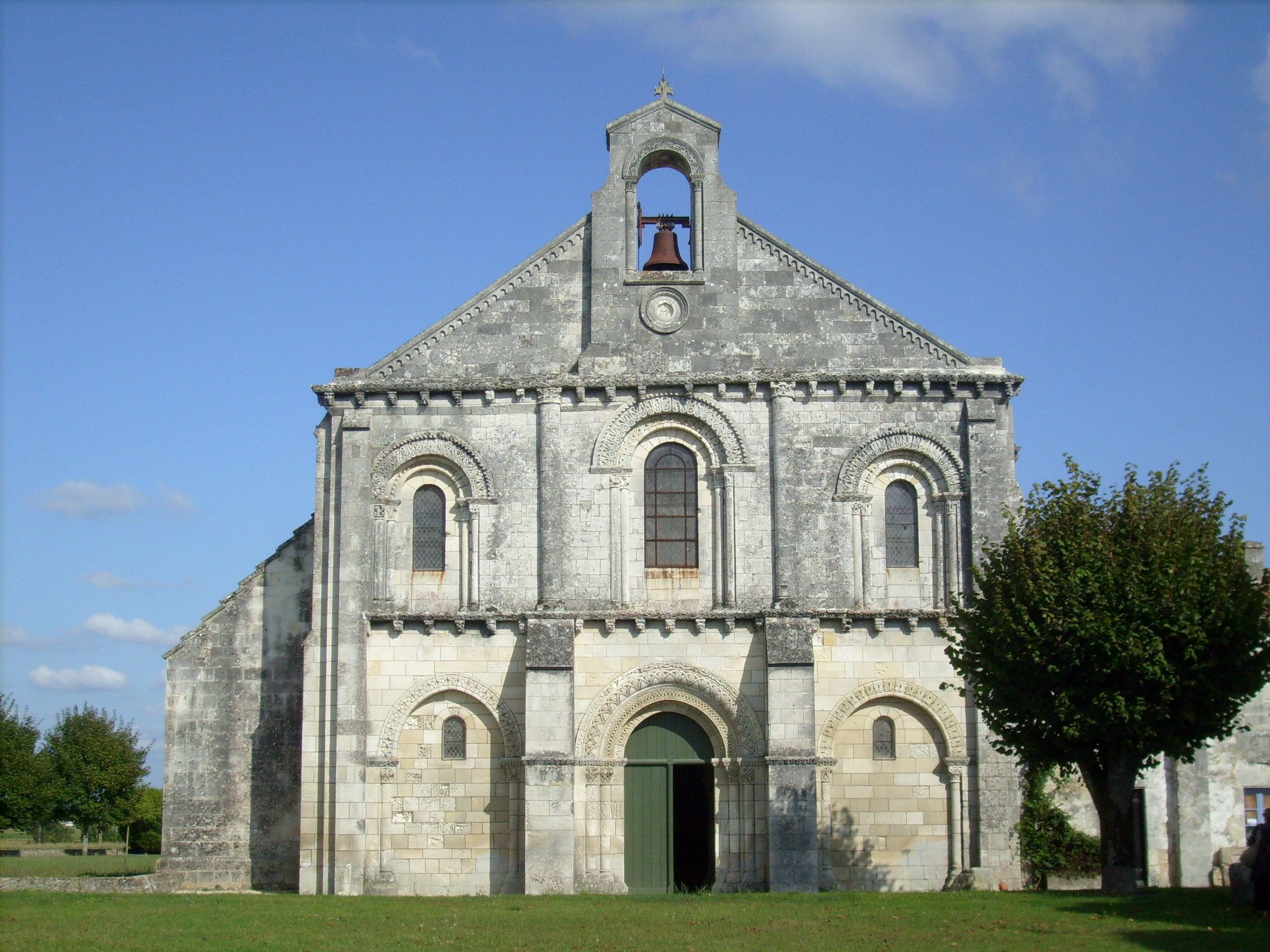 Eglise de Sainte-Gemme (17), France